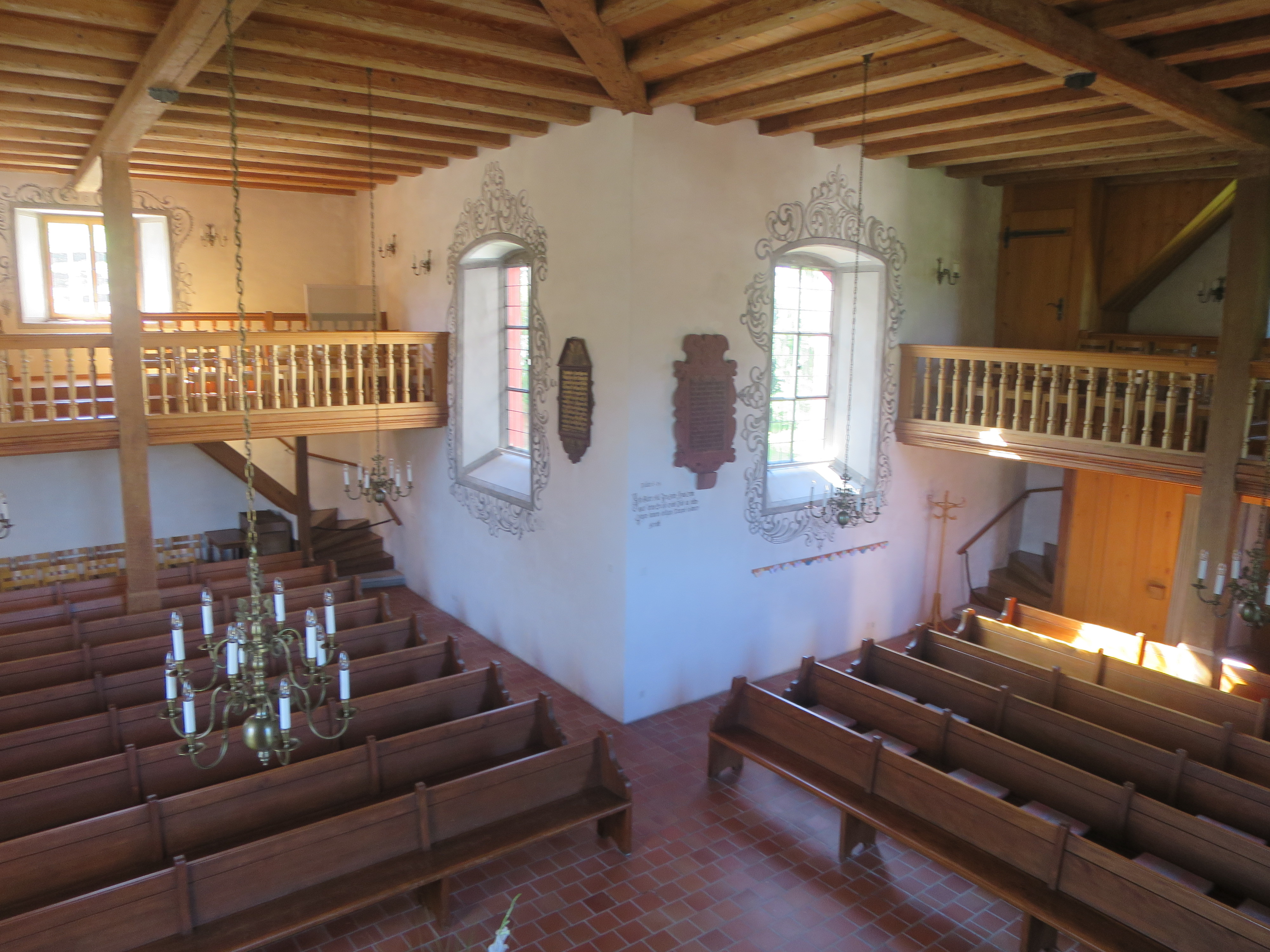 Reformierte Kirche Wintersingen, Schweiz, Winkelhakenschiff